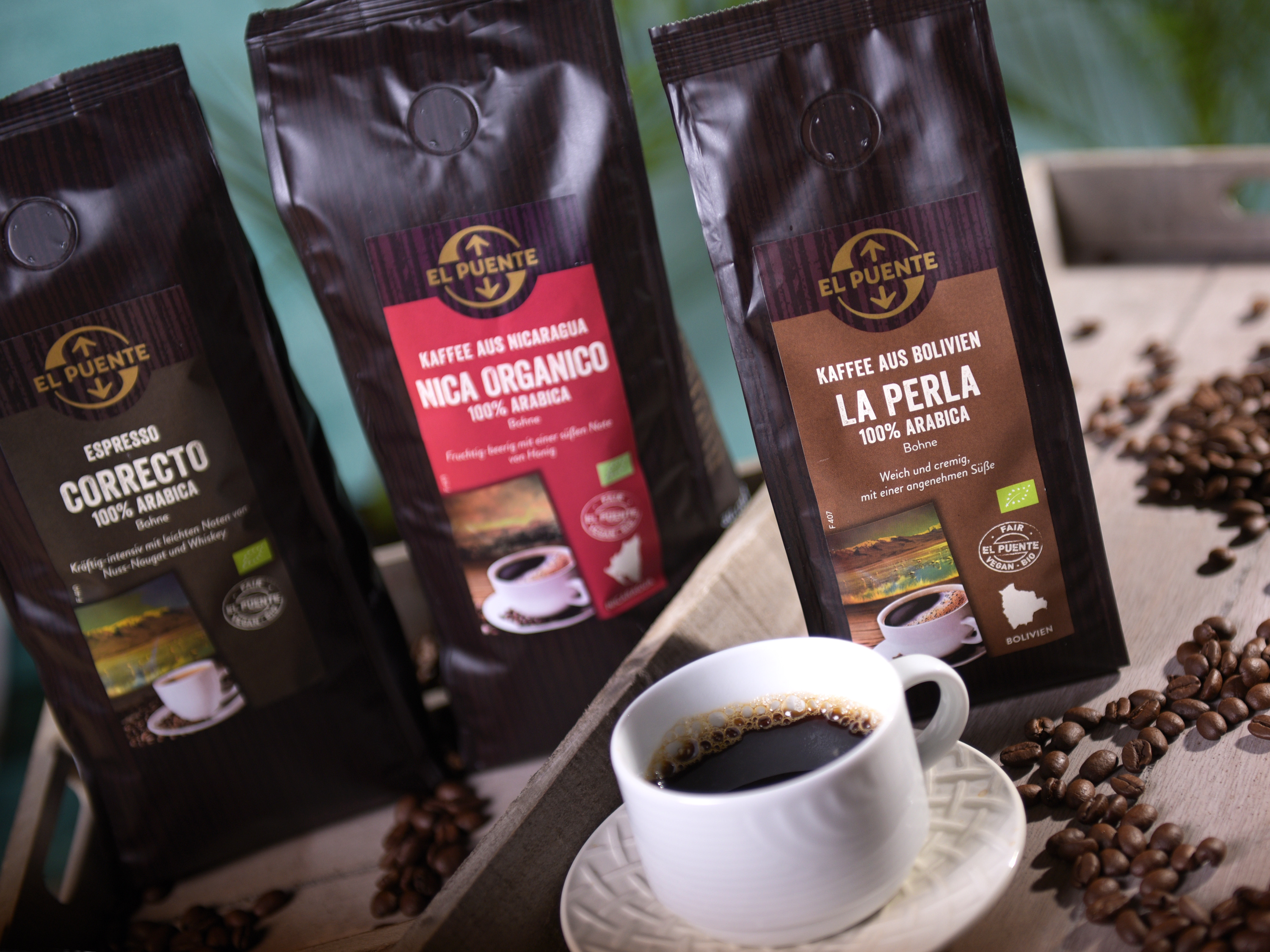 Image